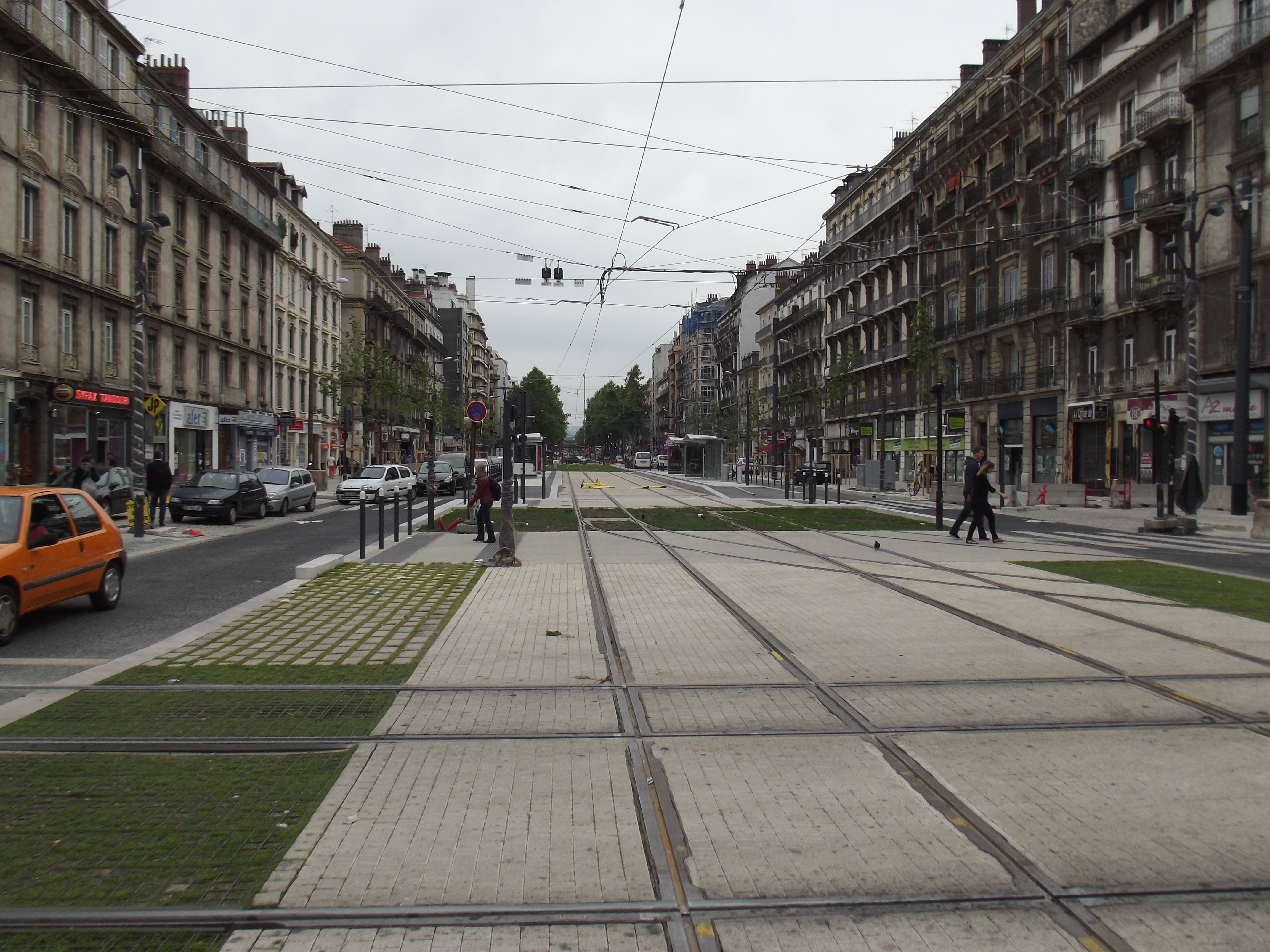 Aanleg nieuwe tramlijn E